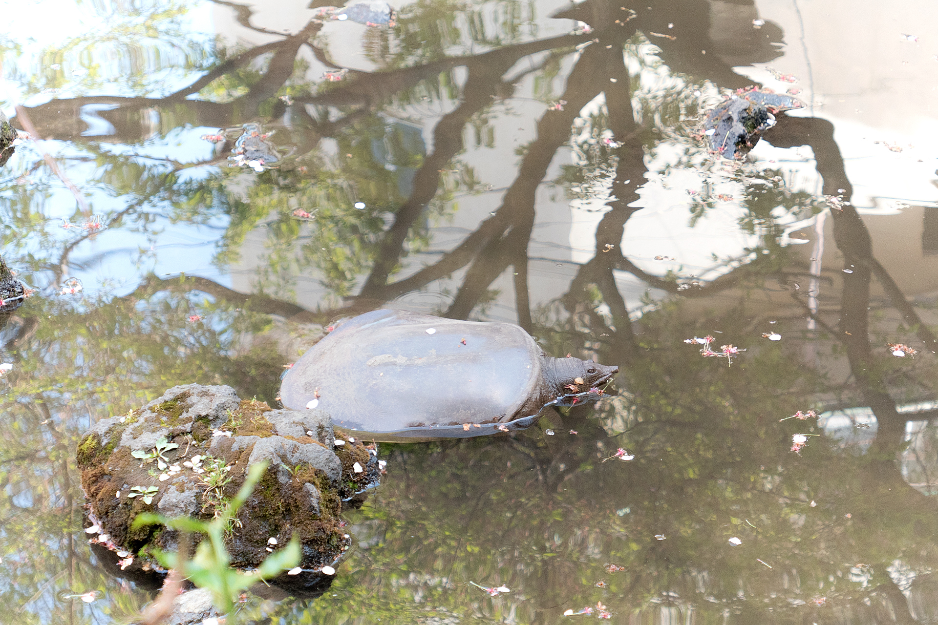 Le centre de Tokyo regorge de petits villages et arrière rues, parfois cachés, de coins de nature calmes, ici c'est en plein centre de Shinjuku, un petit étang est la demeure de ce Suppon âgé de plus de 30 ans, sa taille est d'environ 50cm.